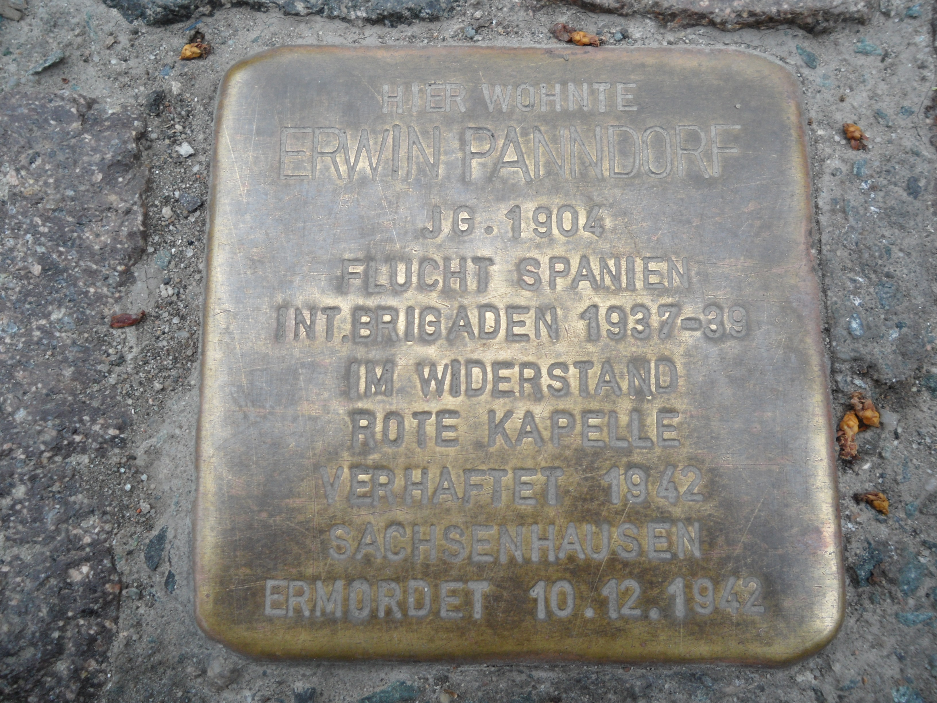 Stolperstein zur Erinnerung an Erwin Panndorf in der Pfarrstraße 4 in Gera. Verlegung des Stolpersteins: 2. November 2012